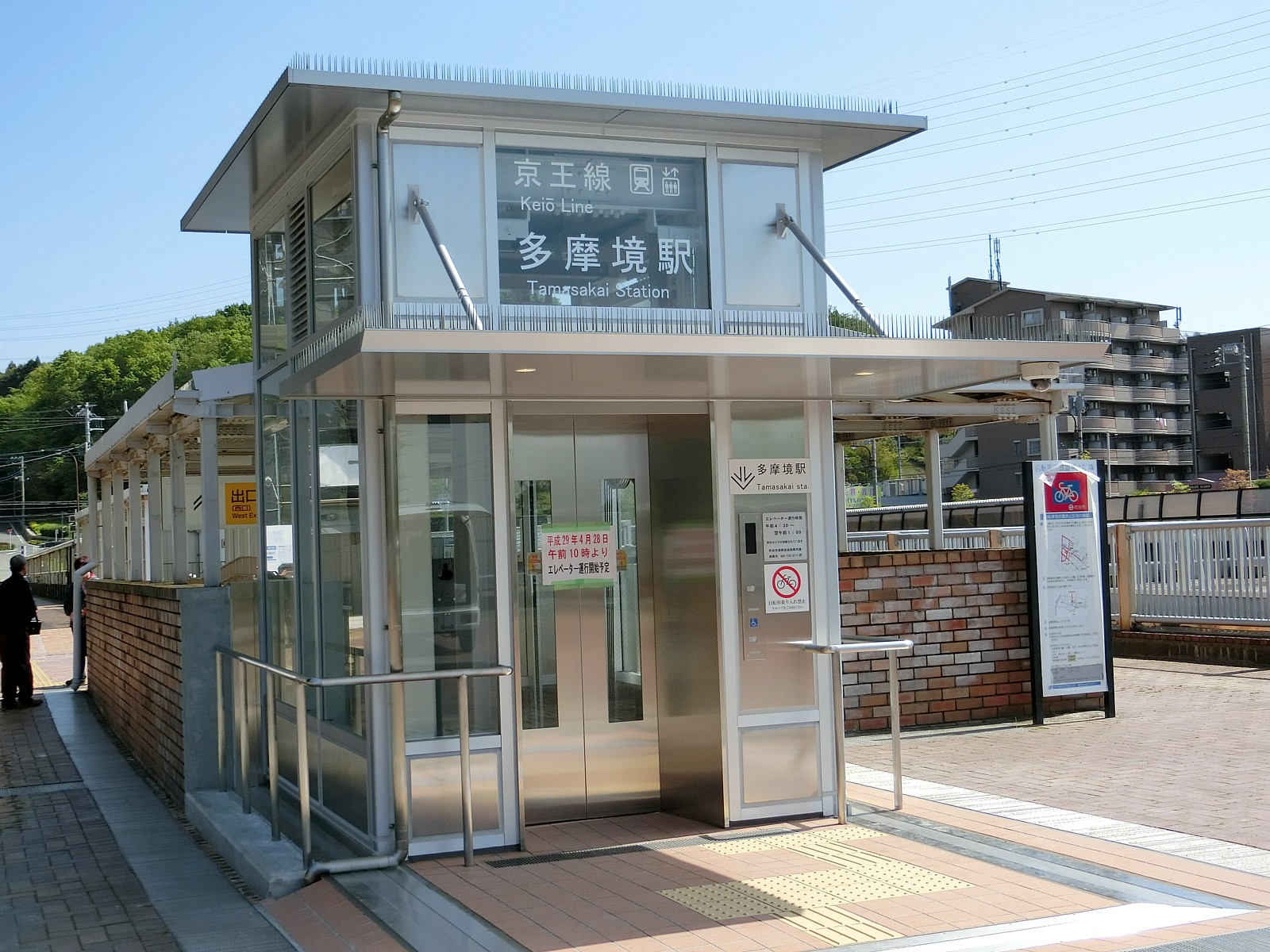 平成29年4月28日より西口B2出口に設置されたエレベーター。